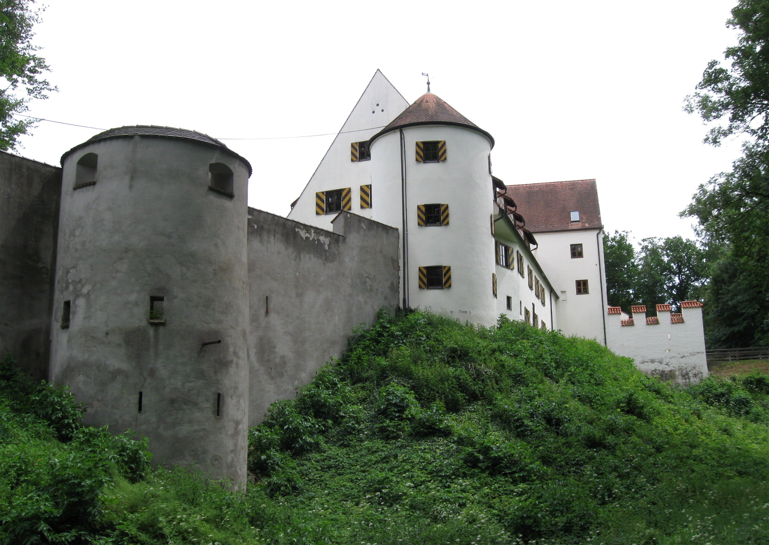 Mindelburg; staufischer Herrschaftssitz, unter Herzog Friedrich von Teck um 1370 erweitert und unter den Herren von Frundsberg im späten 15. und frühen 16. Jahrhundert erneuert; Palas, viergeschossiger Satteldachbau mit Türmchen an der Nordseite und neugotischem Anbau an der Westseite, Fundamente 12. /13. Jahrhundert, im Kern um 1500, um 1670 erneuert, Umgestaltung 1878; Treppenturm und Verbindungstrakt, zwischen Hauptbau und Kapelle, 16. Jahrhundert, Turm um 1670; Schlosskapelle St Georg, Saalbau mit eingezogenem Chor, geschwungenem Giebel und Dachreiter mit Zwiebelhaube, im Kern 1370, Veränderungen 2. Hälfte 15. Jahrhundert, 1684 und 1718; mit Ausstattung; Reste des ehem. Westflügels, Ziegelmauer mit Stützpfeilern und stichbogigem Portal, bez. 1583; Fallturm, zylindrischer Turm mit Gurtgesimsen, Zinnenkranz und südlich angebautem Treppenturm, 1. Hälfte 16. Jahrhundert; Brunnen, gemauert, wohl Ende 15. Jahrhundert; Torhaus, ehem. Benefiziatenhaus, unregelmäßiger, dreigeschossiger, turmartiger Satteldachbau mit Blendarkaden, am Graben errichtet, frühes 16. Jahrhundert; Brücke und Futtermauern des Abschnittsgrabens, wohl frühes 16. Jahrhundert; Wohnhaus, zwei- bzw. dreigeschossiger Satteldachbau mit Fachwerkobergeschoss, Verbindungsbau zwischen äußerem Tor und Rundturm der Ringmauer, im Kern wohl 16. Jahrhundert; Burgschenke, wohl ehem. Torwächterhaus, dann Kornmesserhaus, zweigeschossiger Satteldachbau, im Kern 16./17. Jahrhundert, Veränderungen 18.-20. Jahrhundert; Ökonomiegebäude, erdgeschossiger Satteldachbau, 19. Jahrhundert; Äußeres Tor, viereckiger Torturm mit tonnengewölbter Durchfahrt und Satteldach, im Kern Ende 15./Anfang 16. Jahrhundert, Veränderungen 17./18. Jahrhundert; Barbakane, dem äußeren Tor vorgelagert, im Kern 15./16. Jahrhundert; Befestigungsanlage, Ringmauer mit Rondellen und Rundtürmen, um Haupt- und Vorburg angelegt, Ziegelmauerwerk, spätes 15./frühes 16. Jahrhundert